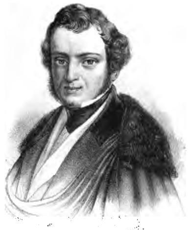 Anastasius Grün